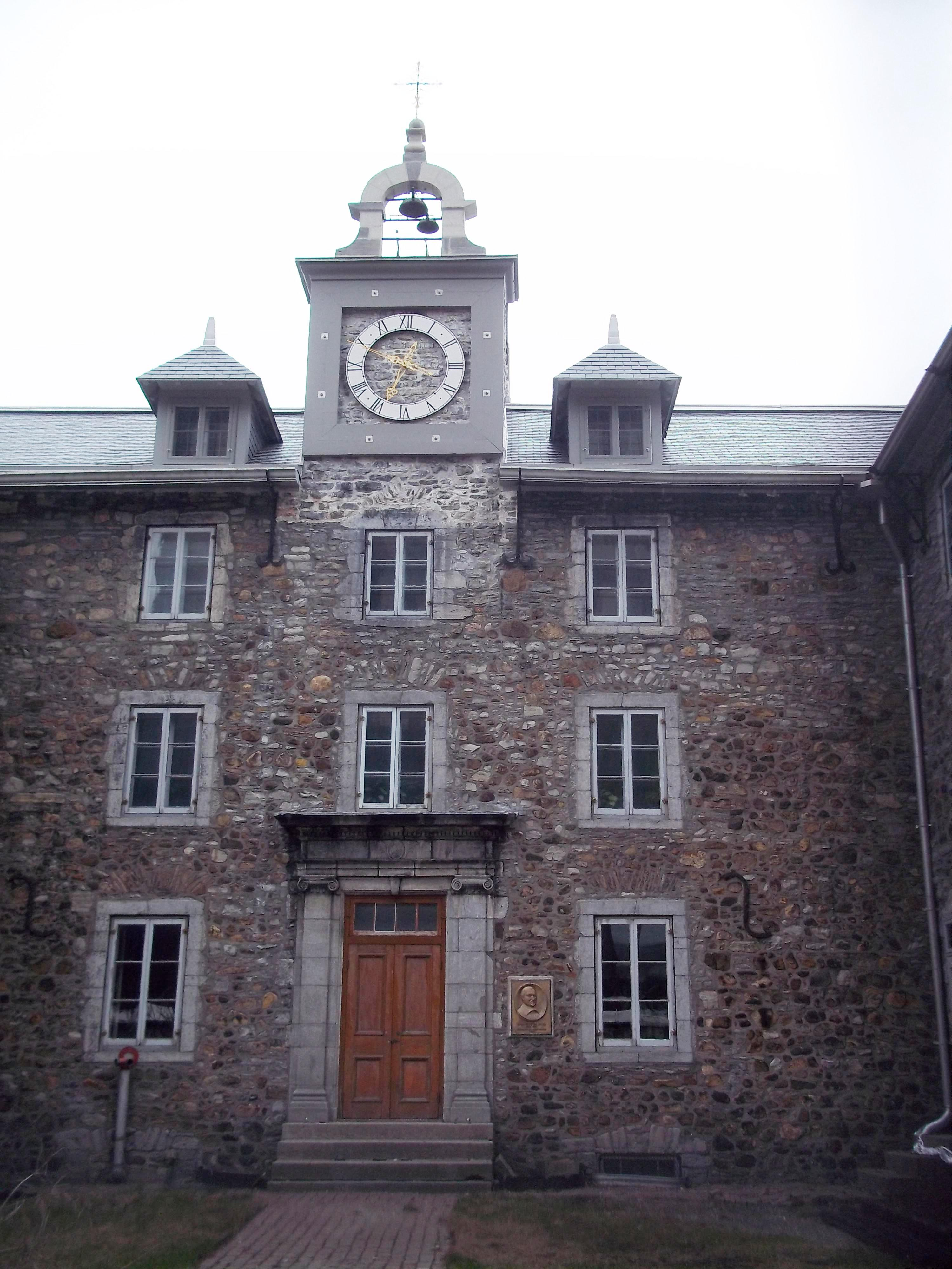 Le Vieux Séminaire de Saint-Sulpice, au 116 Notre-Dame Ouest, à Montréal. Construit en 1684 sur des plans de François Dollier de Casson.